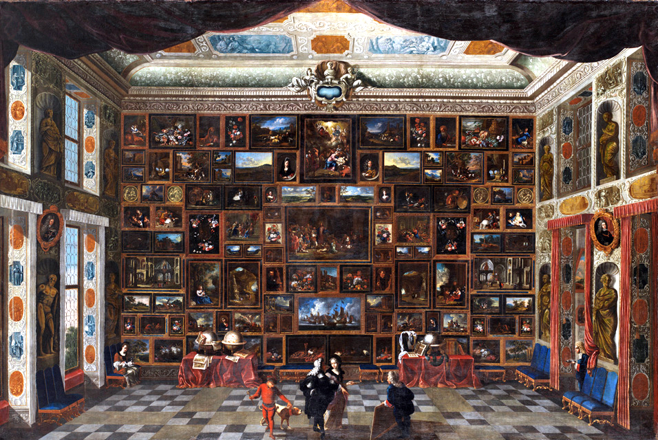 Gemäldegalerielabel QS:Lde,"Gemäldegalerie"